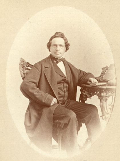 Antoine-Olivier Berthelet